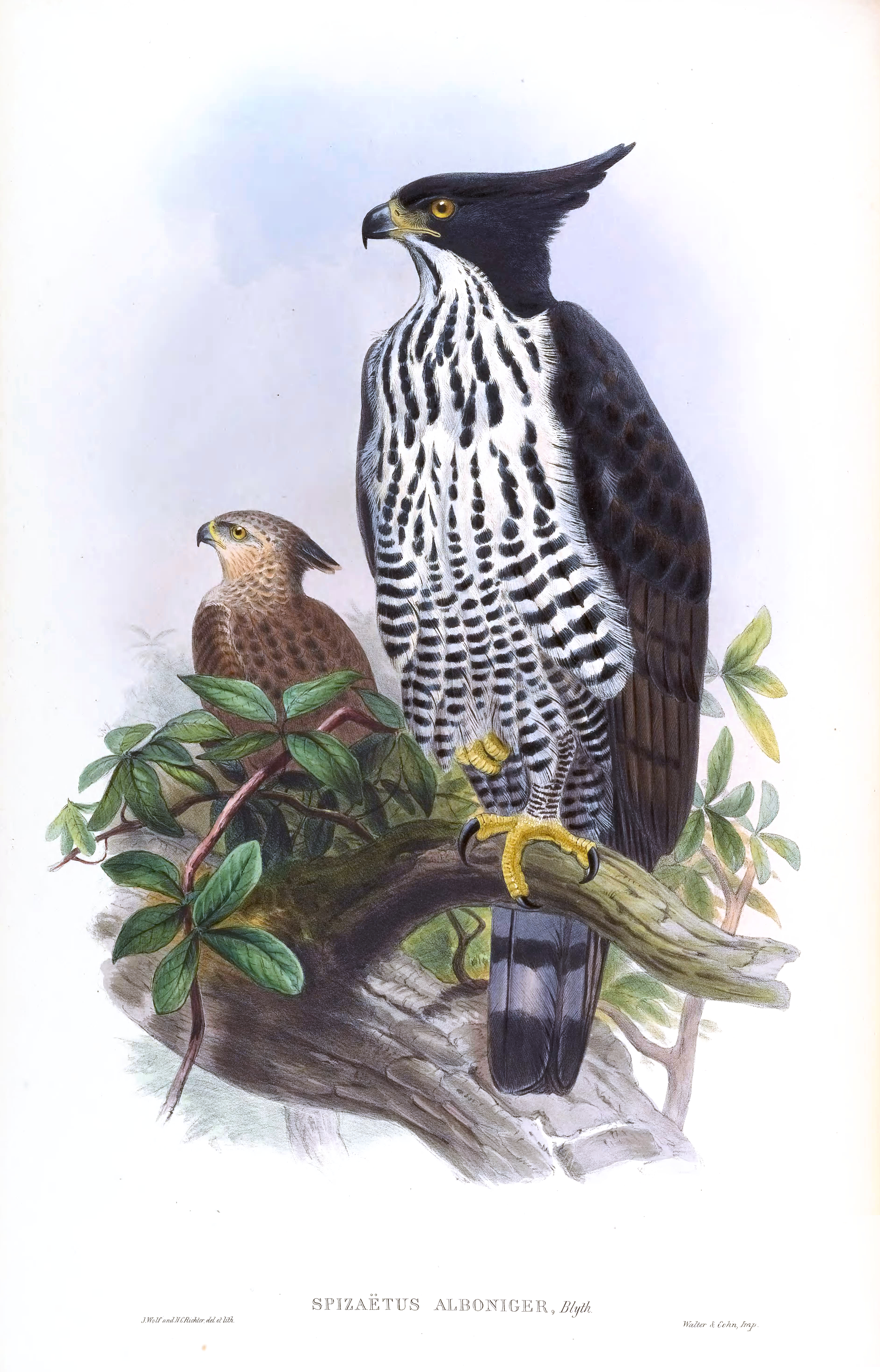 Blyth's Hawk-Eagle Nisaetus alboniger (Gmelin)